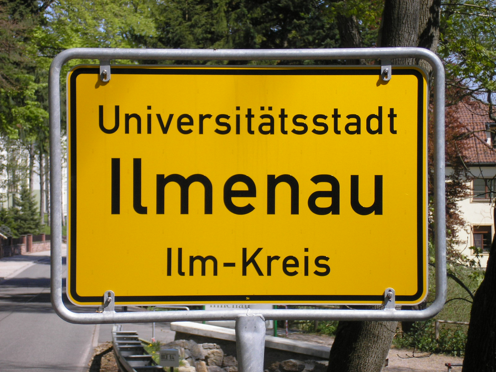 Das Ortseingangsschild von Ilmenau in der Waldstraße.